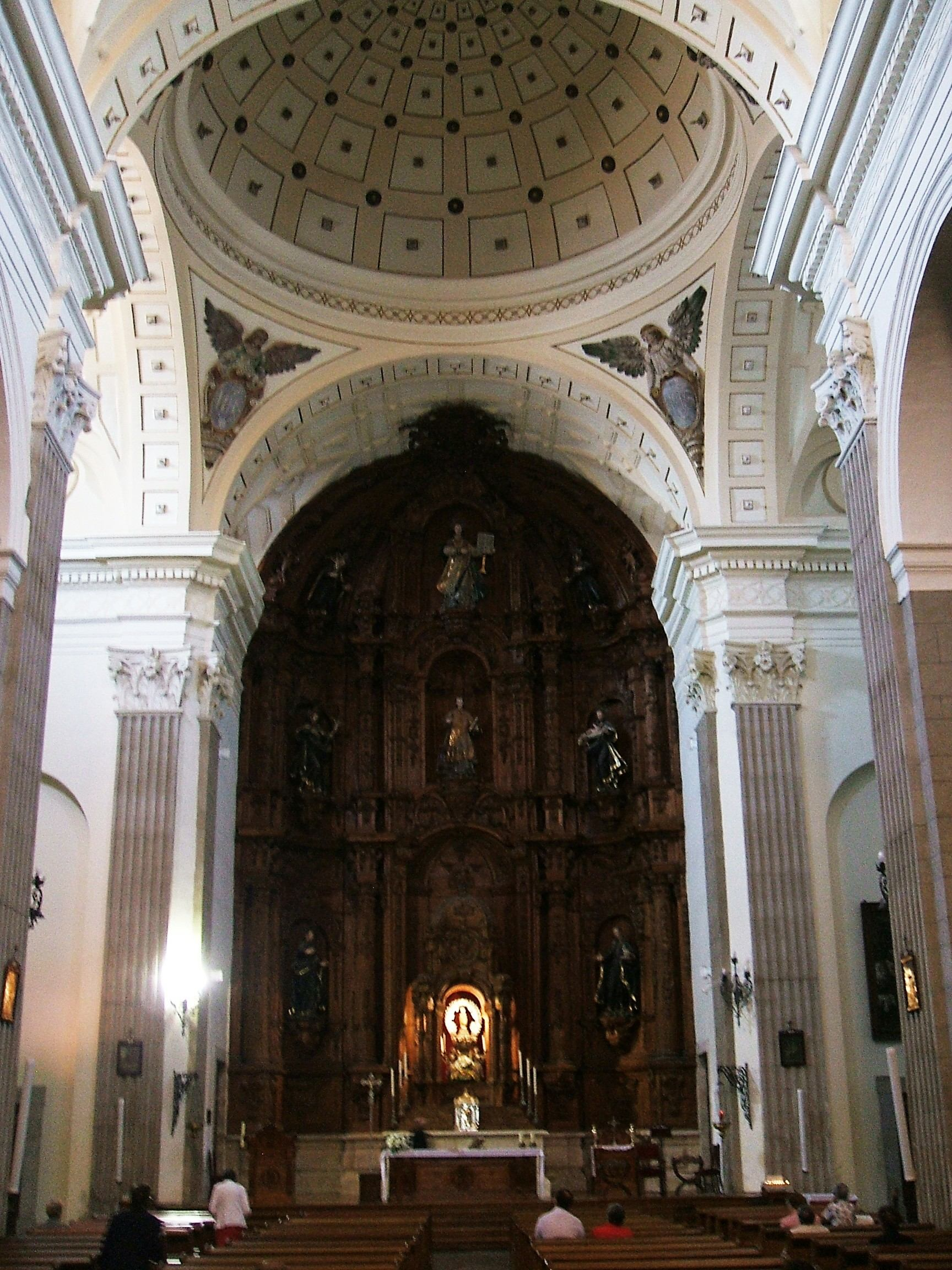 Iglesia de Nuestra Señora de la Calle, o de La Compañía, construcción jesuítica de finales del S-XVI - Palencia, Castilla y León, España